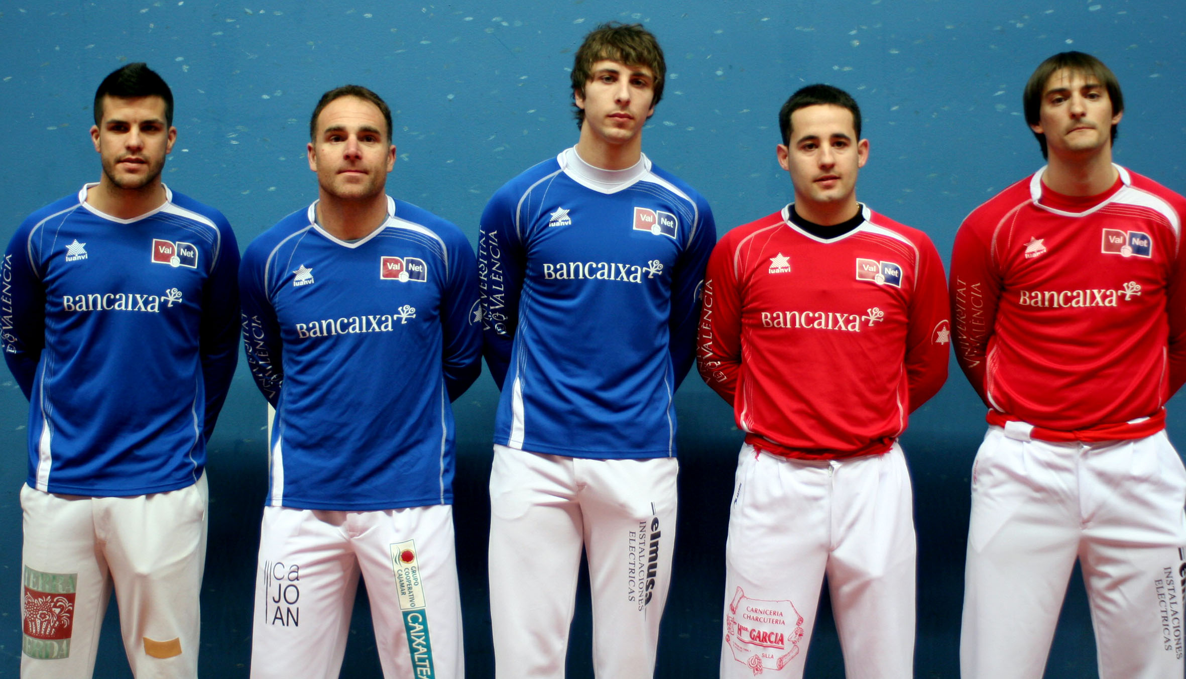 final circuit bancaixa 2012 2013 ciutat de la pilota